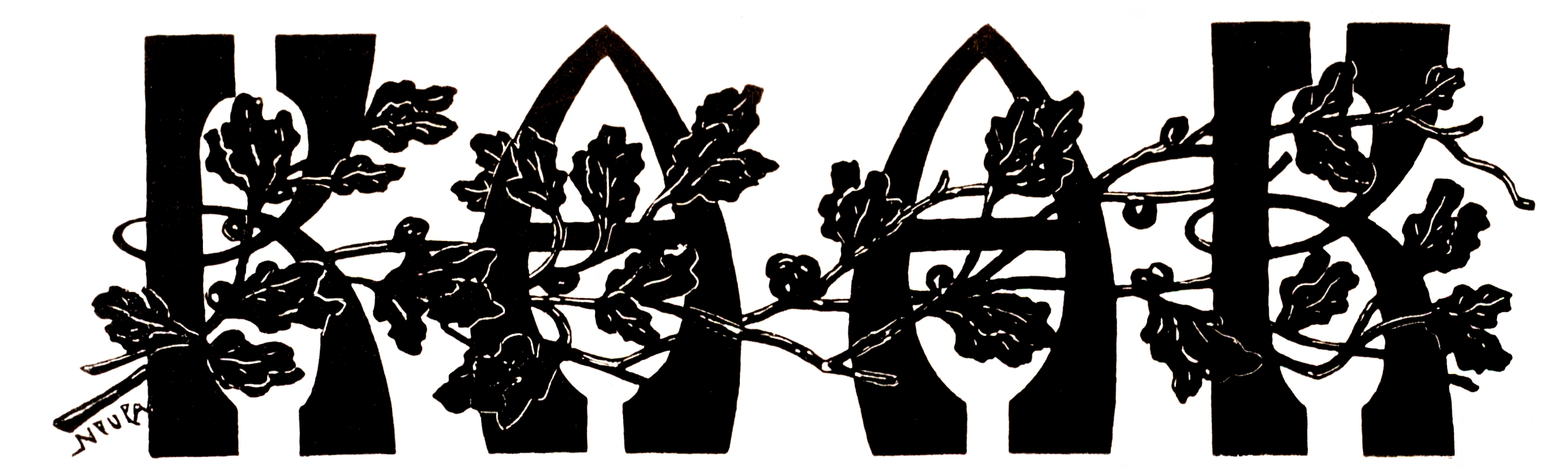 Ajalehe Kaak päis